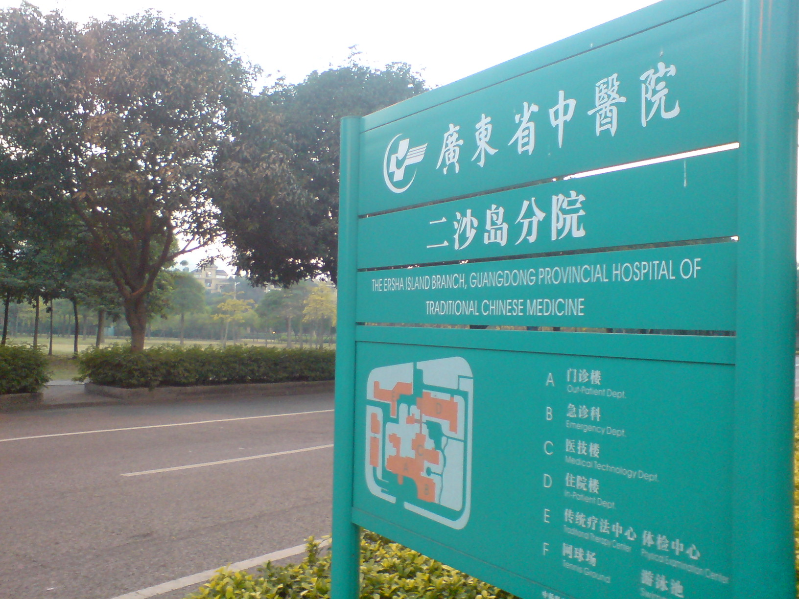 广东省中医院二沙岛分院的指示牌